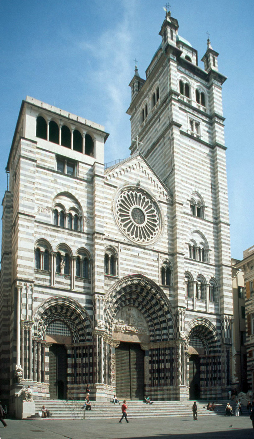 Genua 2004